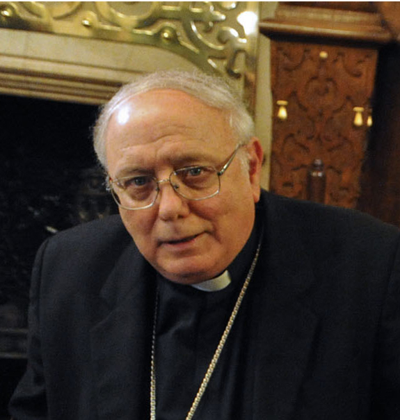 José María Arancedo, titular de la Conferencia Episcopal Argentina